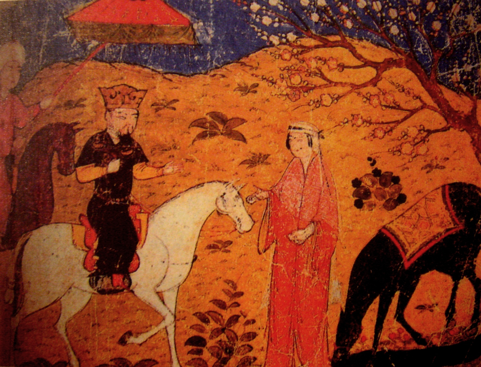 Ghazan on horse